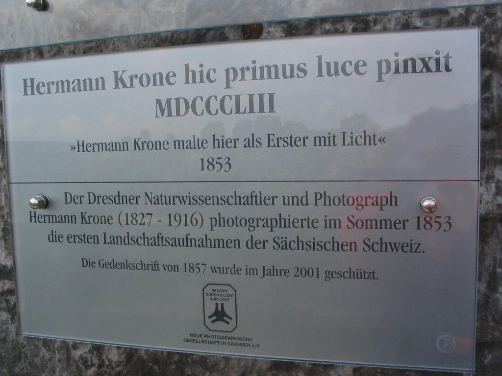 Tafel für den Fotografen Hermann Krone in der sächsischen Schweiz